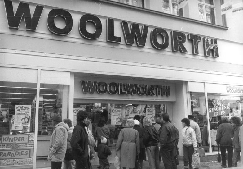 Halle, Warenhaus, Woolworth ADN-Friedrich Gahlbeck 5.12.90 Halle: Das erste Kaufhaus der Woolworth-Cooperation öffnet am 6.12. auf einer Fläche von 650 Quadratmetern seine Tore in der City der Stadt. 61 Hallenser fanden hier eine neue Arbeit, die Verkäuferinnen des Konsum wurden übernommen. Das Gebäude ist seit 1933 im Besitz der Woolworth-Kette und ist jetzt wieder bezogen worden.